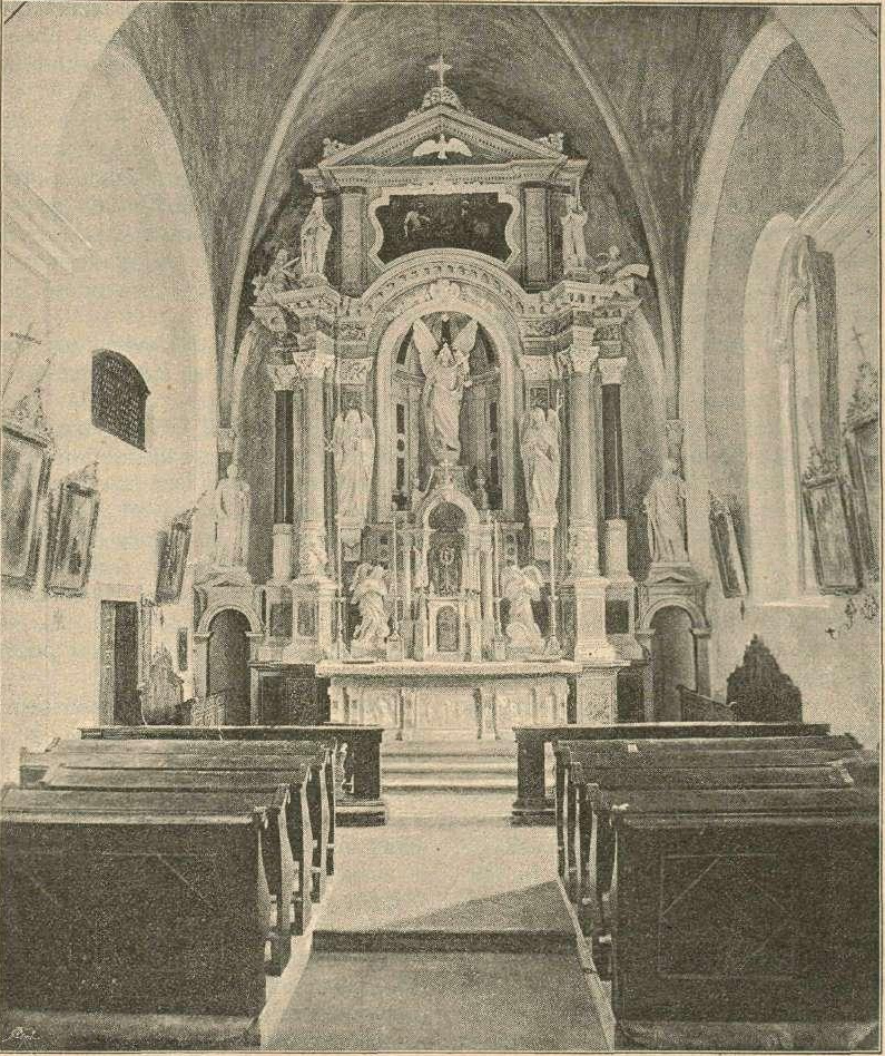 Veliki oltar sv. Mihaela v cerkvi na Blokah.